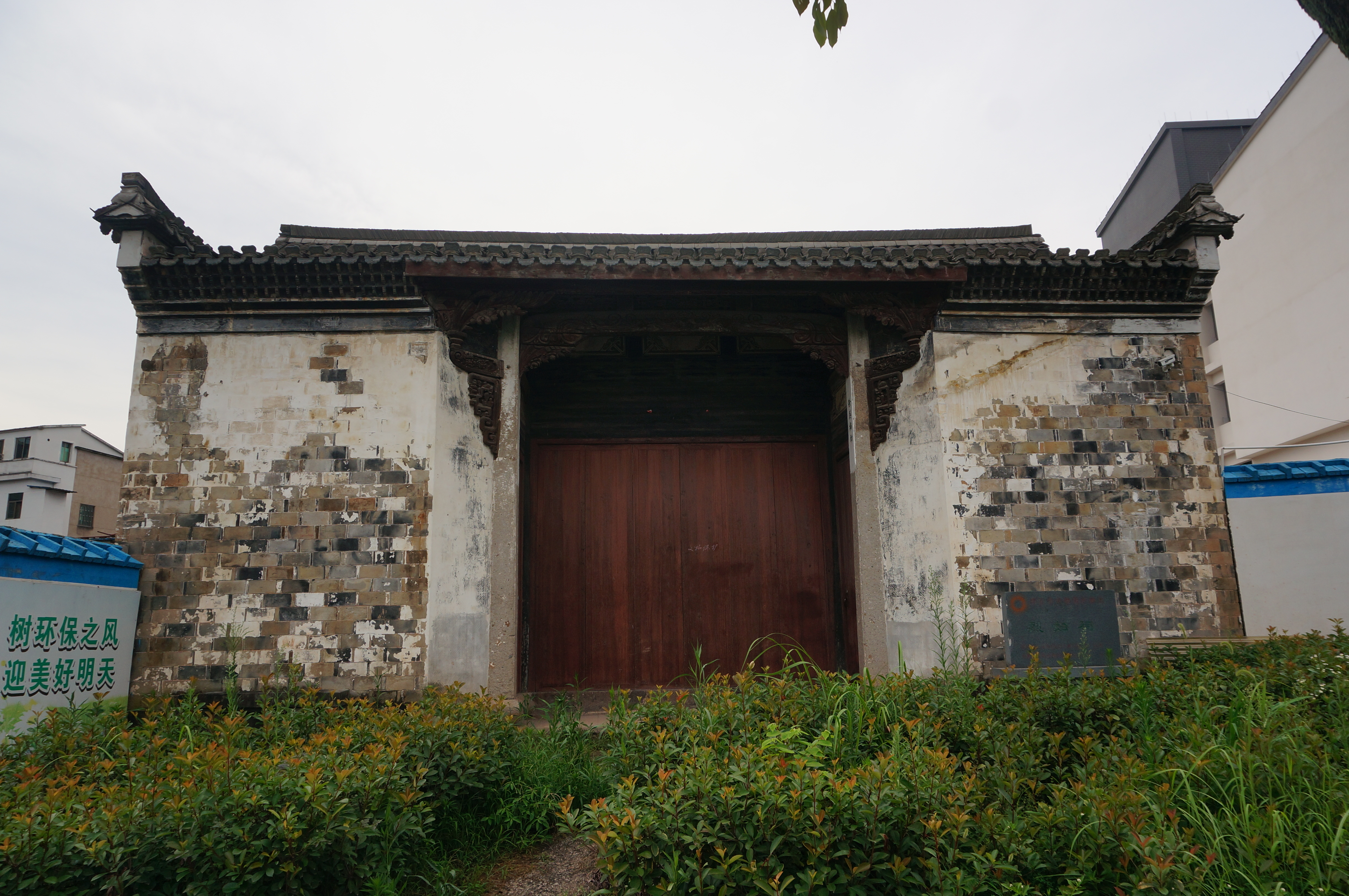 永康烈妇祠（吴绛雪祠），南面。